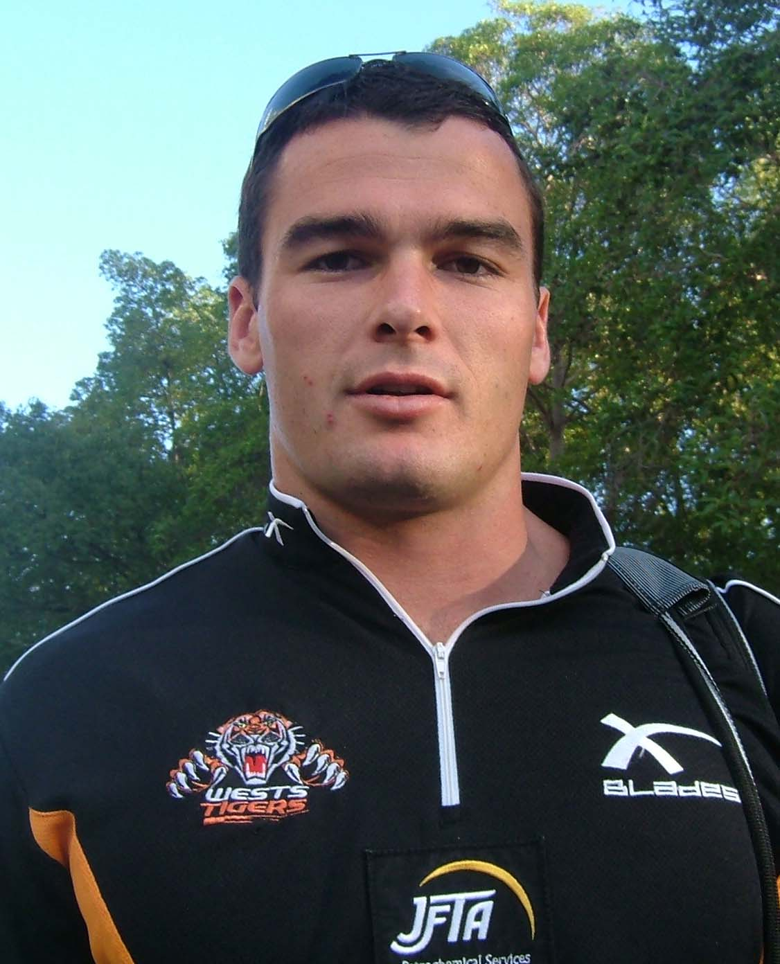 WestsTigers Winger Daniel Fitzhenry - Parramatta Stadium 2005